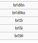 Vārda brī "brīvs" locījumu tabulas (jeb paradigmas) (LĒL 16. tips) fragments. Redzamie locījumi ir daudzskaitļa datīvs, instrumentālis (translatīvs-komitatīvs), illatīvs, inesīvs un elatīvs: brīdõn — "brīviem"; brīdõks — "(kļūstot) par brīviem/ar brīviem"; brīži — "uz brīviem/brīvos (virziens uz)"; brīši — "brīvos"; brīšti — "no brīviem". (piezīme: vārdu līdzība neliecina par ģenētisku saikni: "brīvs" un brī (arī igauņu prii) sākotnēji aizgūti no viduslejasvācu frī (Karulis, Suhonen, EES)).